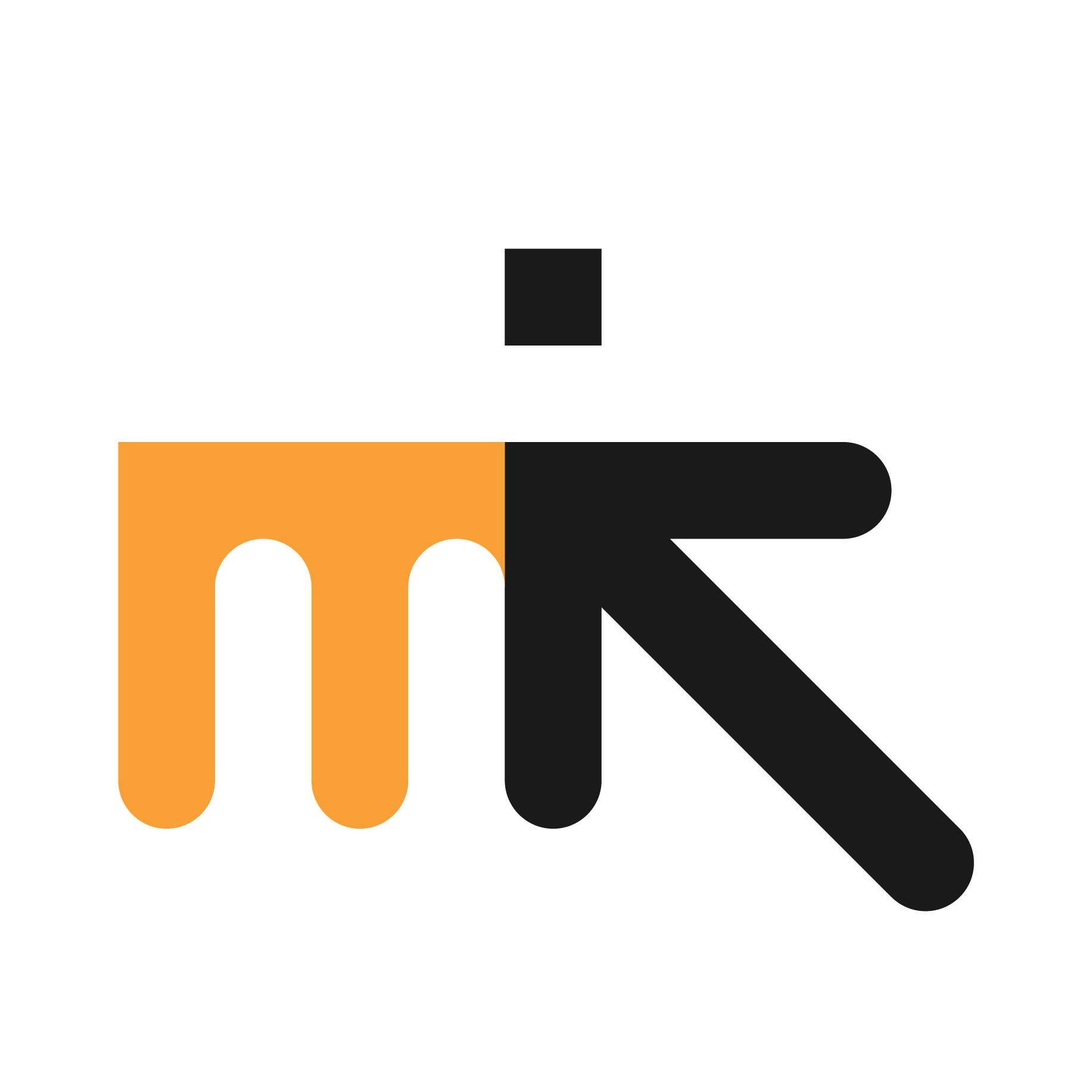 Mladá kamera logo